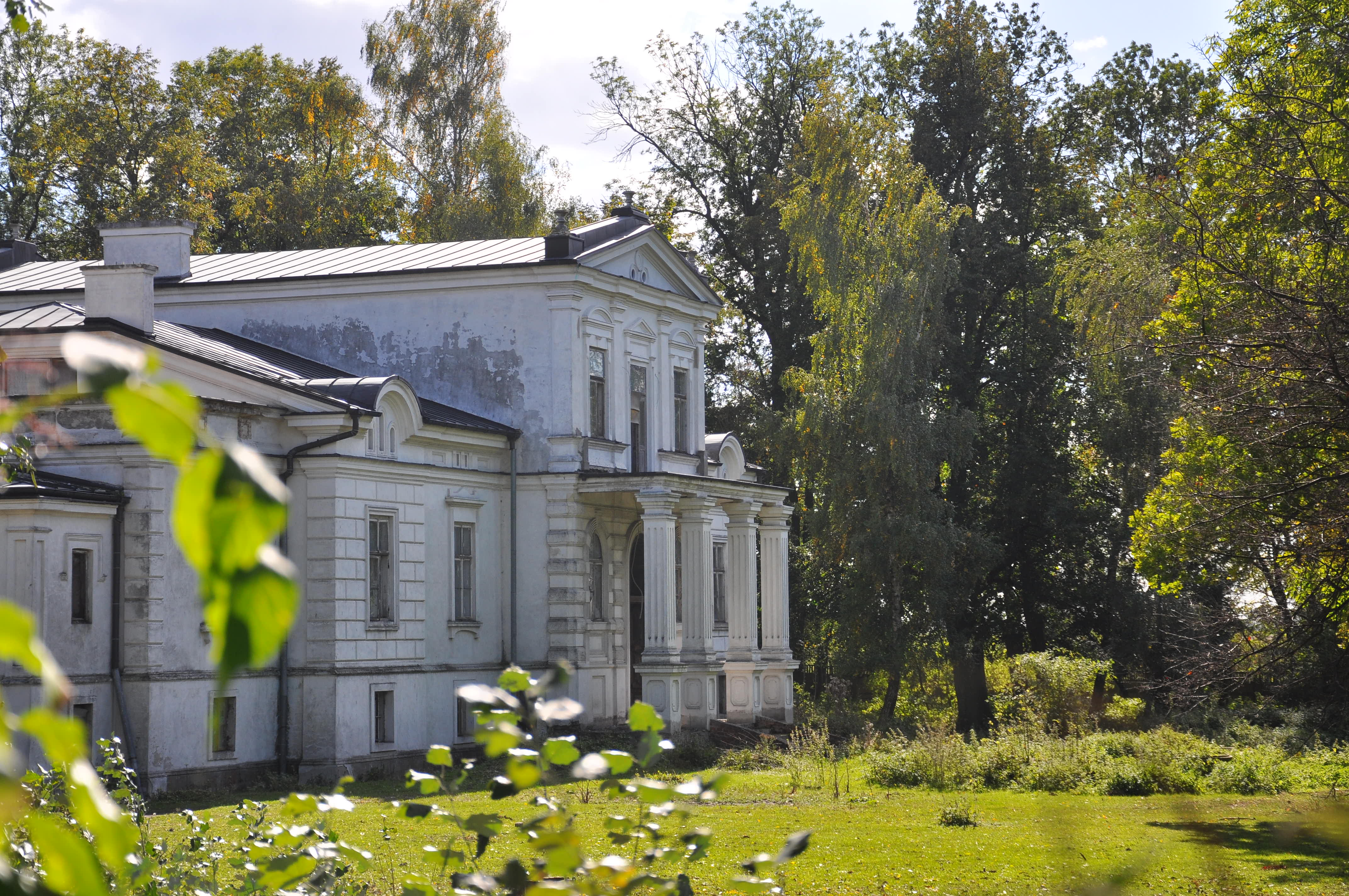 pl} Krzewata, Olszówka